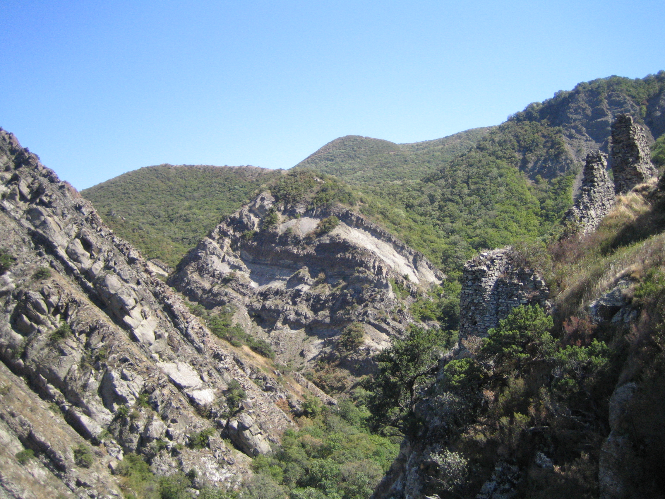 Ruins of Armazi citadel